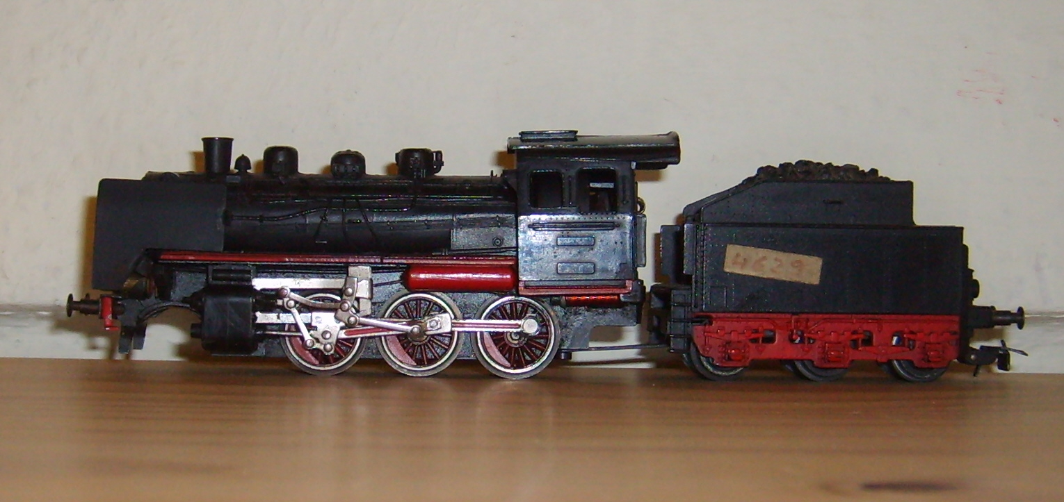 H0 Modellbahn-Lok Gützog